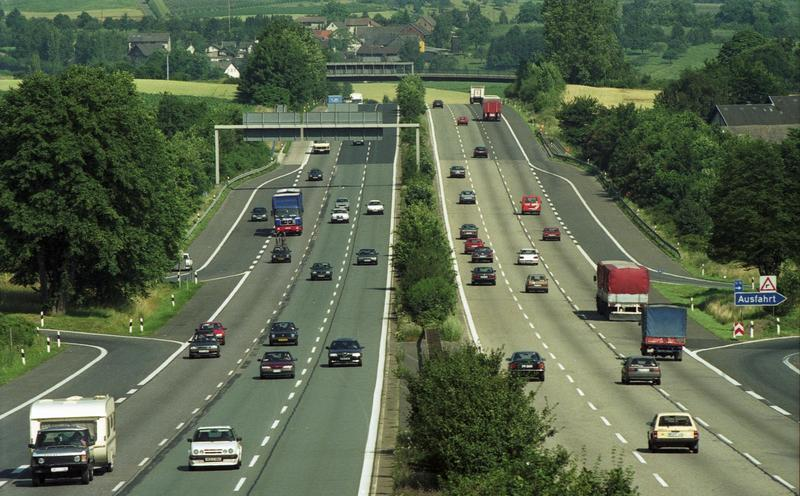 Bonn, 23.7.1991 Ferienverkehr auf der Autobahn bei Bad Honnef.